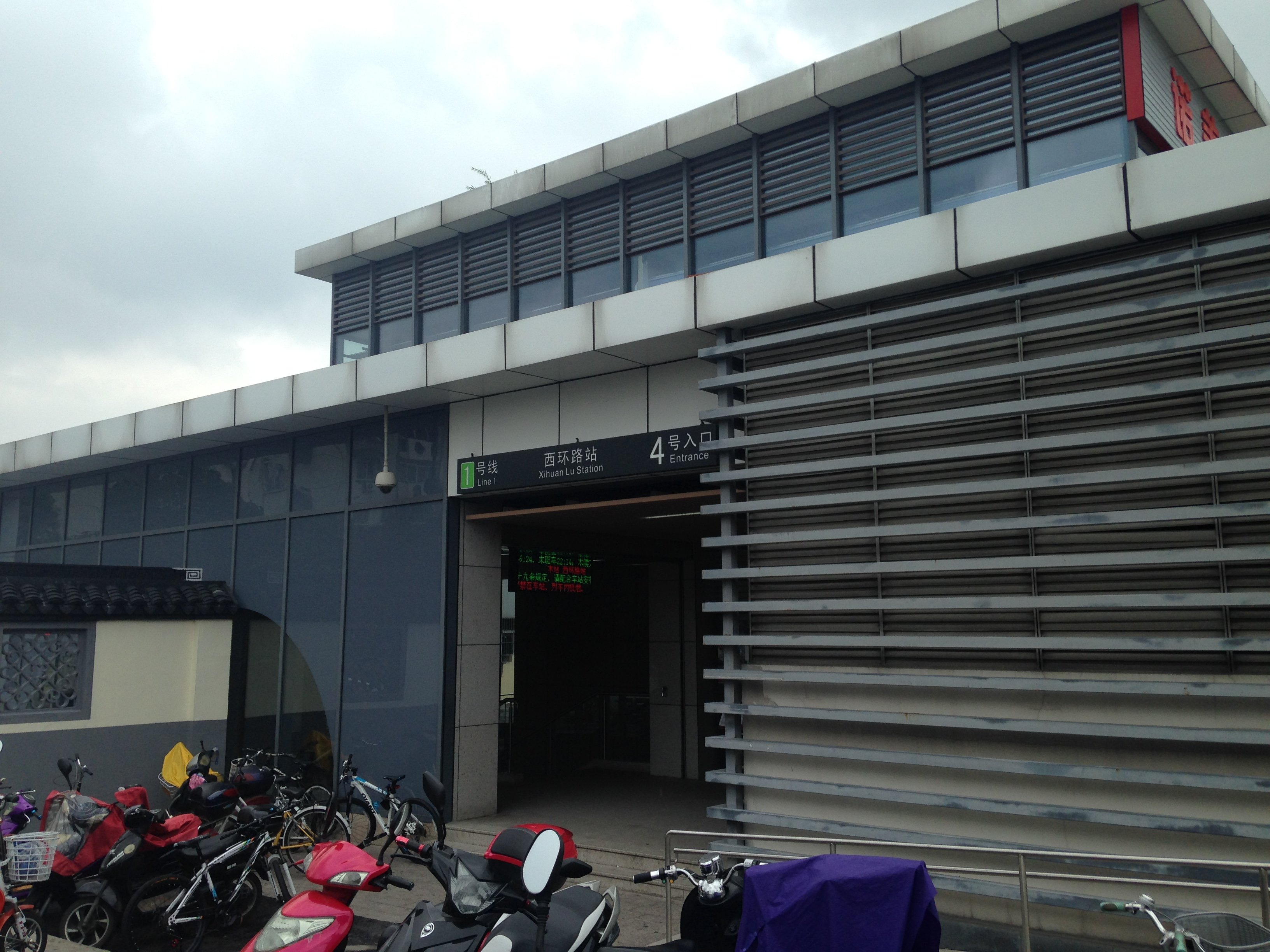 西環路駅の4番出入り口